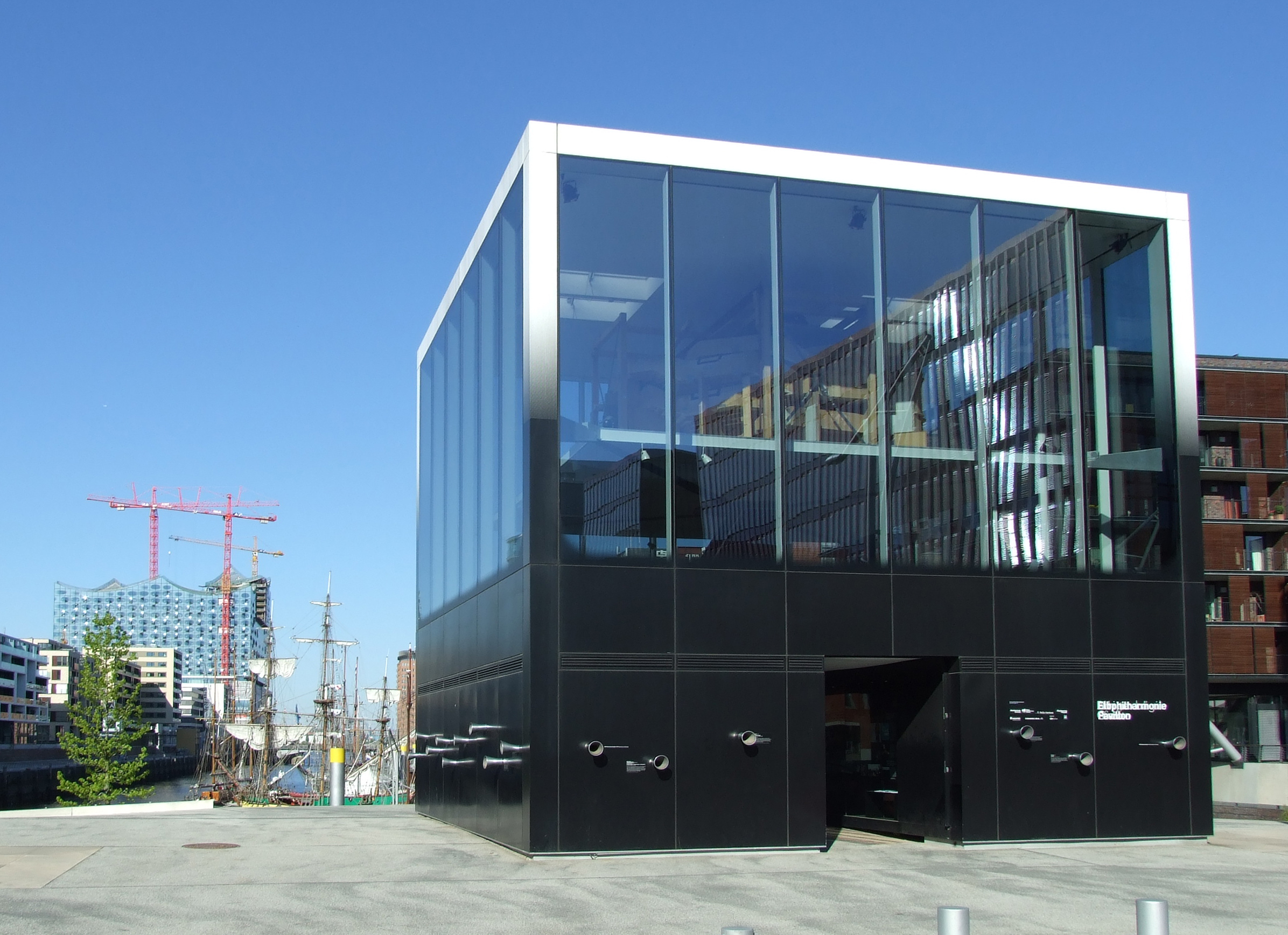 Elbphilharmonie Pavillon